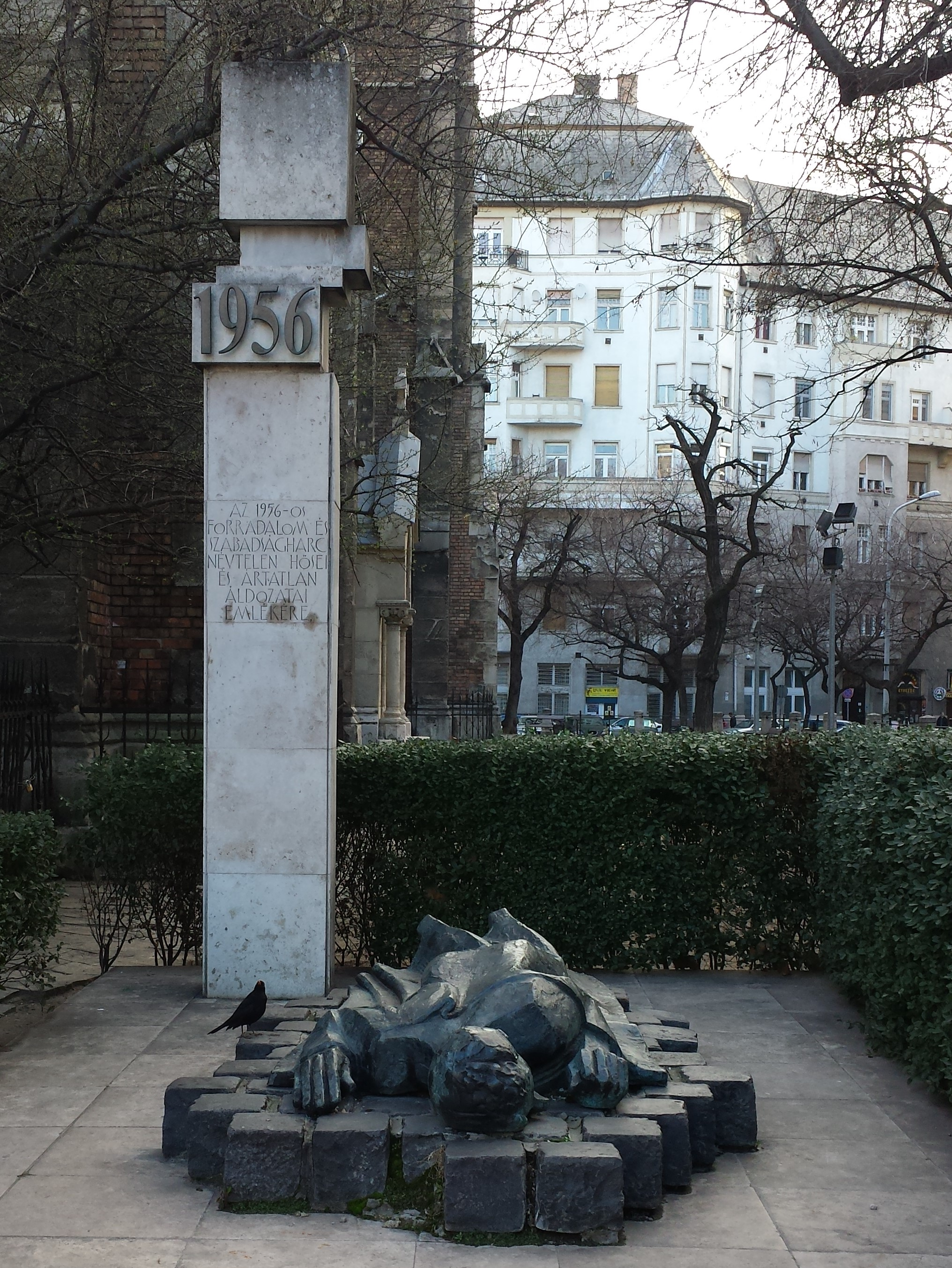 Gedenkstätte für die Opfer des Volksaufstandes von 1956 1956-os emlékmű (Czinder Antal, 1993) - Magyarország, Budapest, IX. kerület, Bakáts tér, az Assisi Szent Ferenc-templom mellett van.